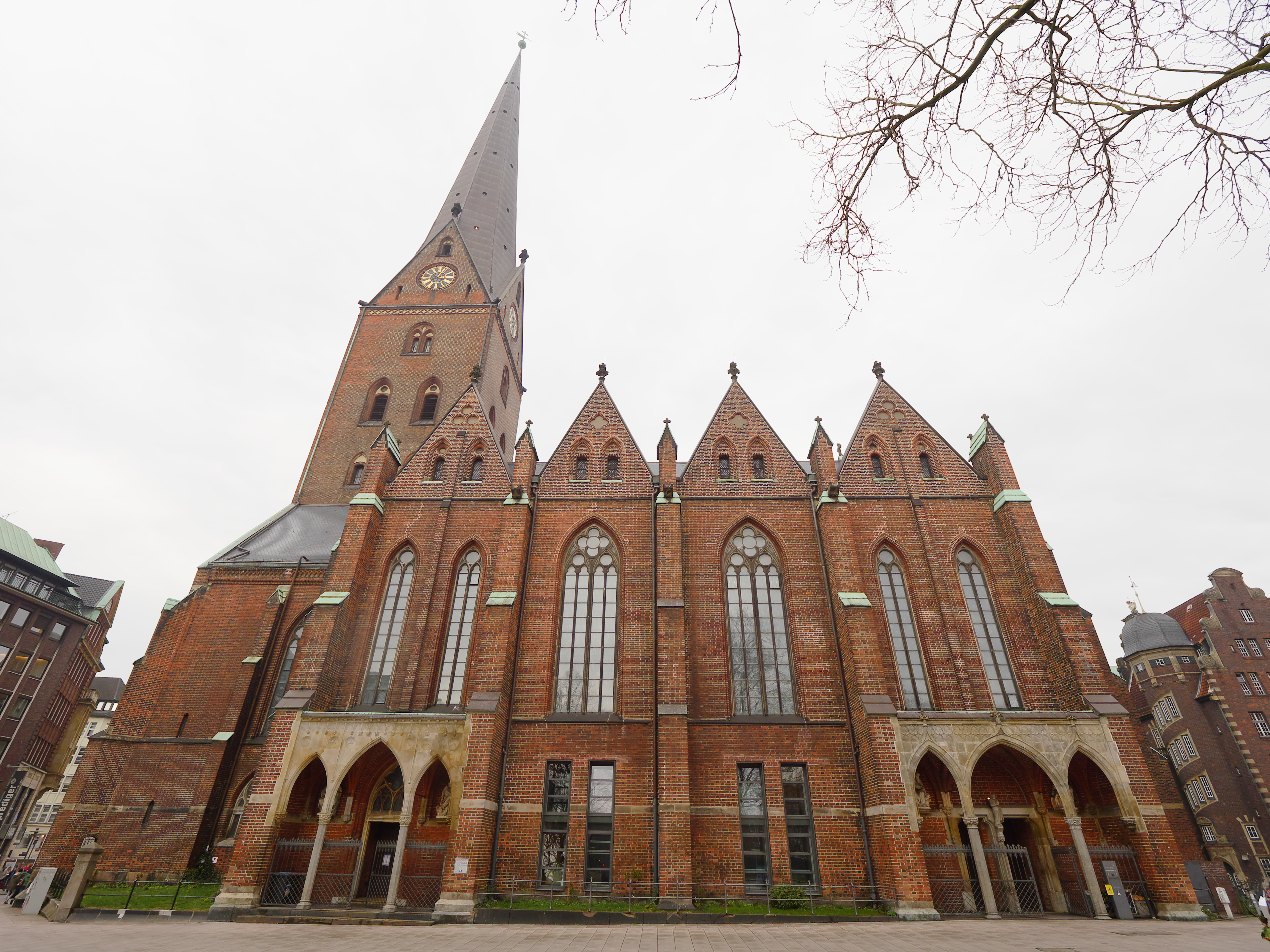 Südansicht der Hauptkirche Sankt Petri (Hamburg) vom Speersort aus gesehen